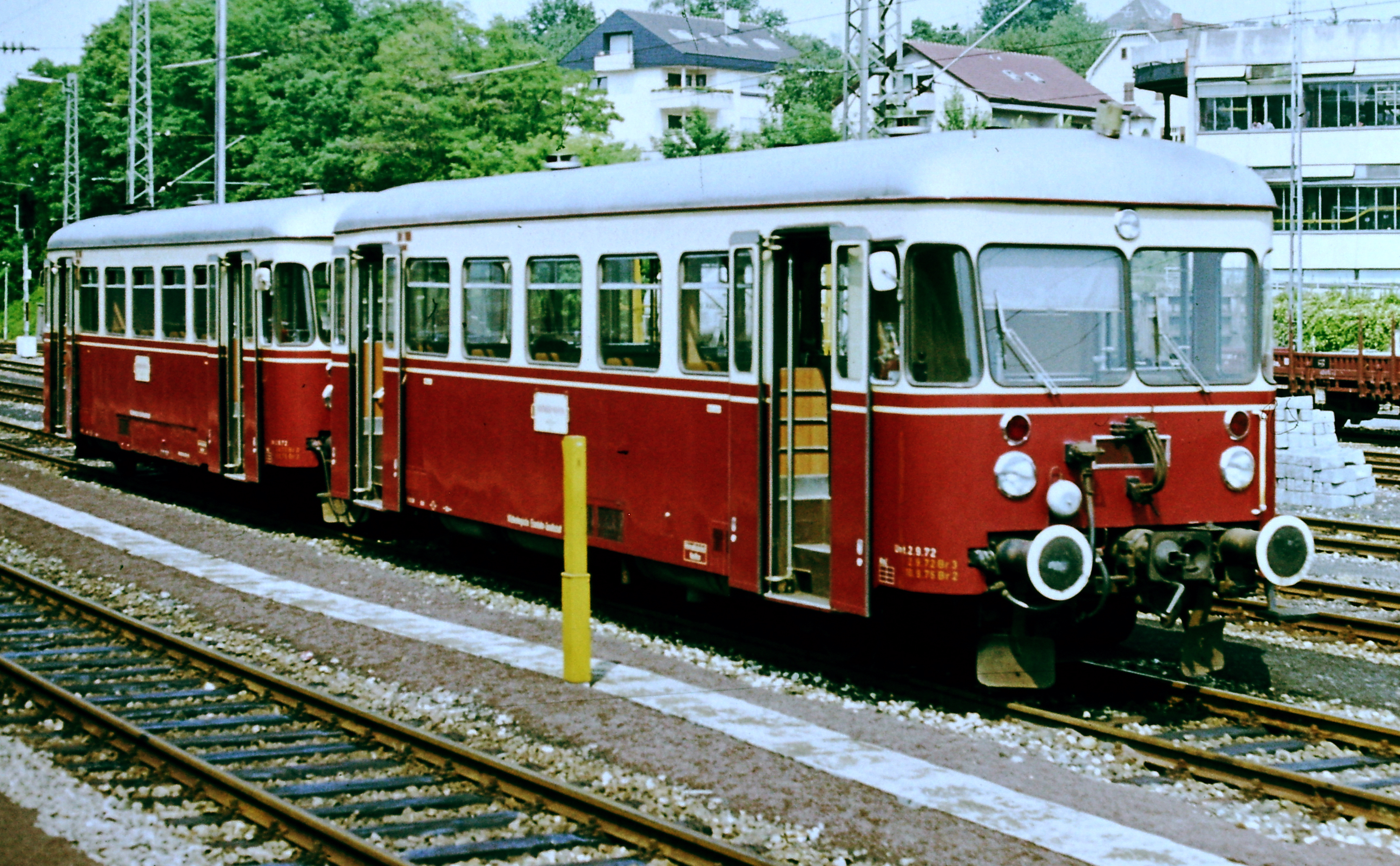 Württembergische Nebenbahnen (WN) treinstellen T23 en T24 van het type Gmeinder en bovenbouw van Auwärter te Nürtingen.[1]